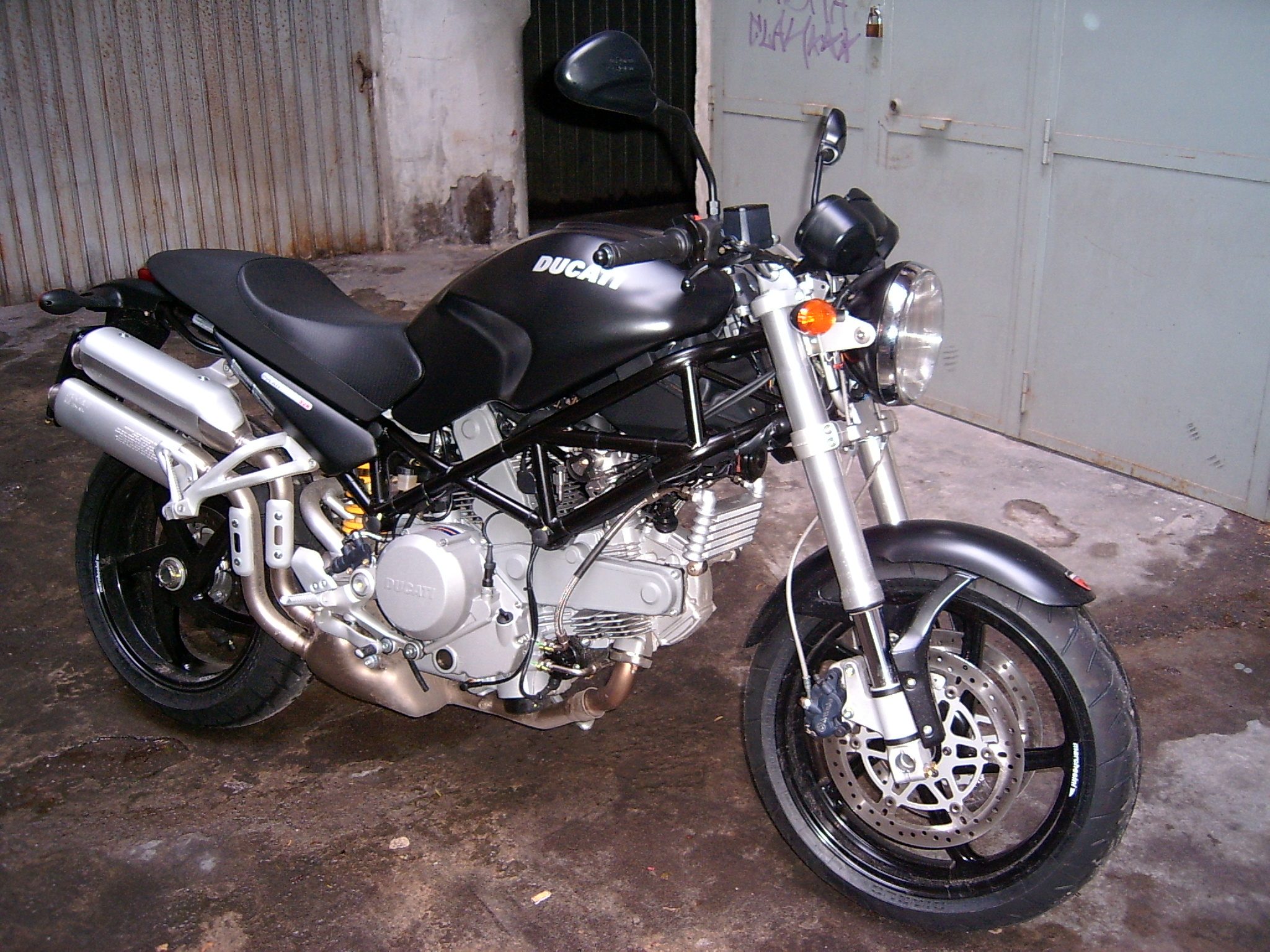 Ducati Monster S2R Dark